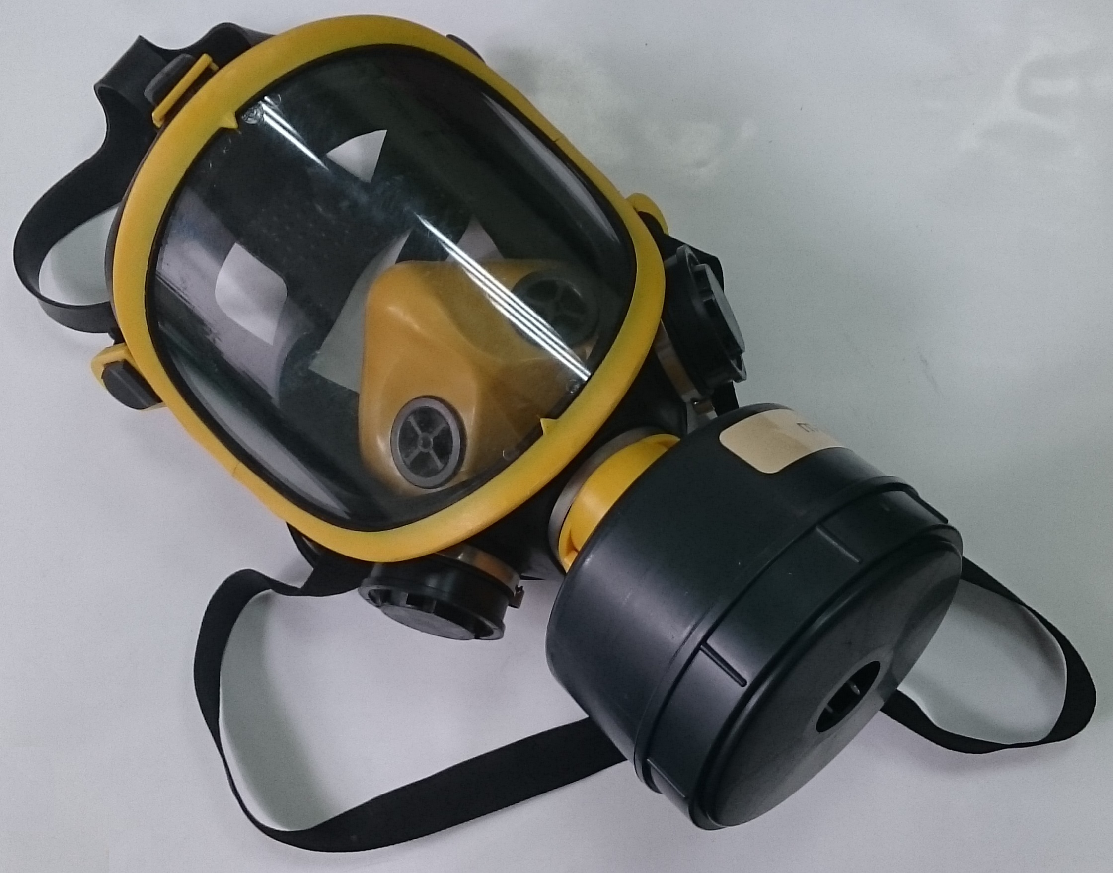 Противогаз гражданский фильтрующий ГП-9